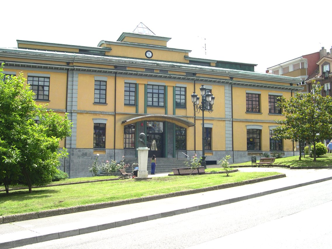 Casa'l conceyu Smra. Asturies